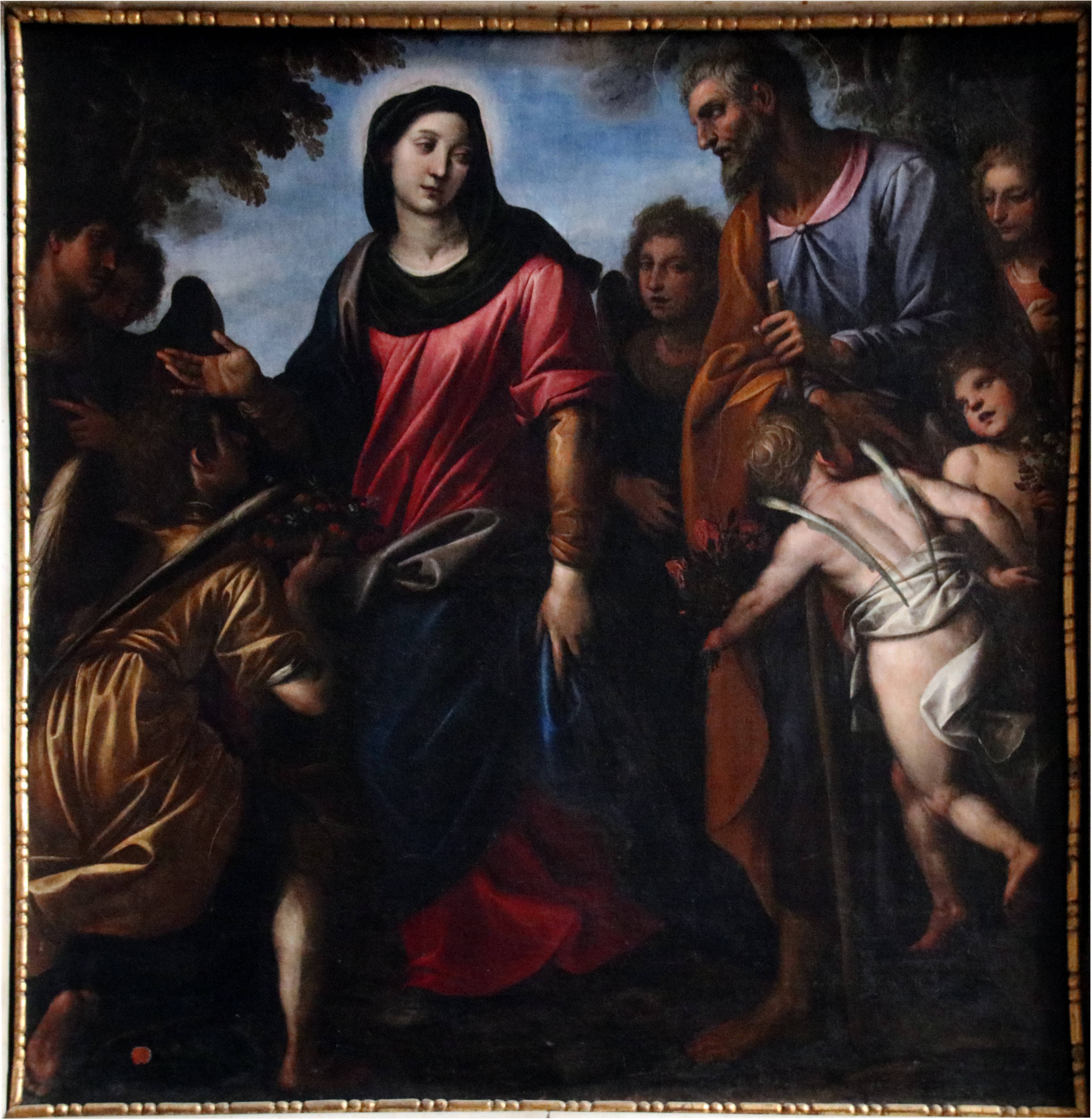 Domenico Cresti detto il Passignano, Incontro della Vergine con Giuseppe, 1602